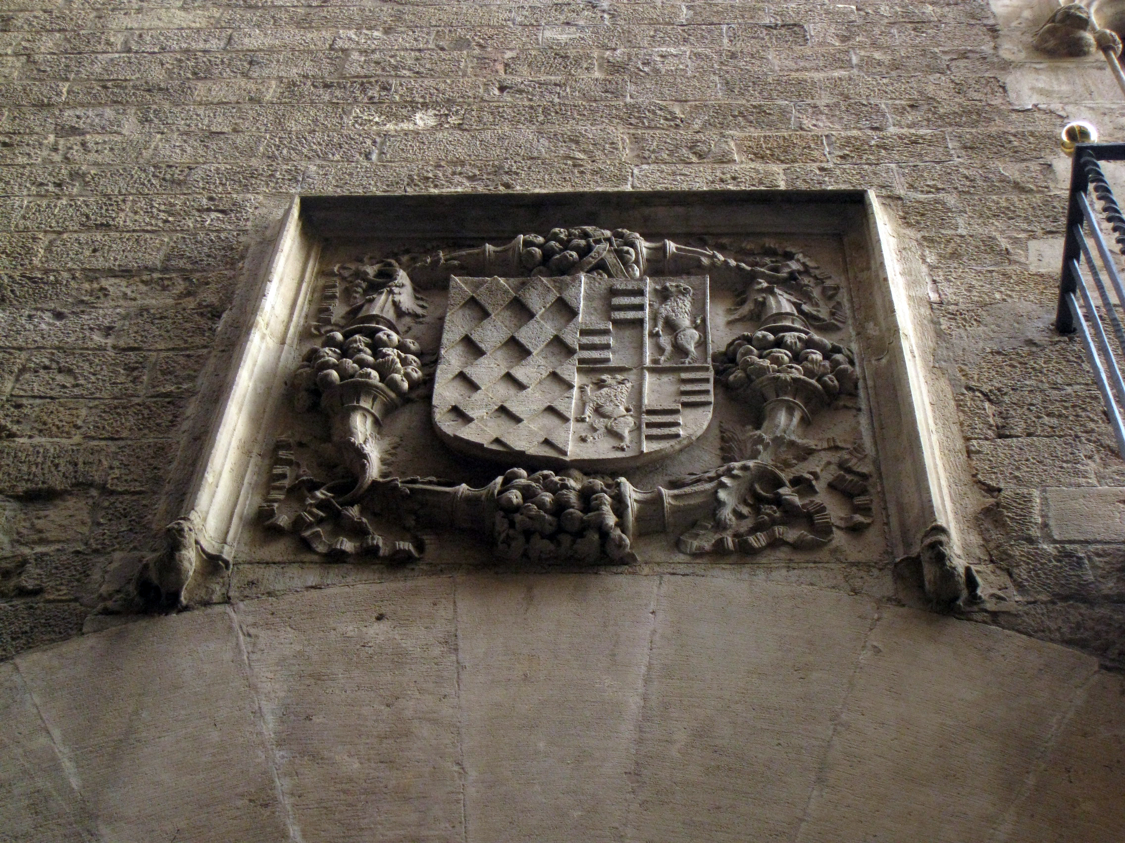 Palau Centelles (segle XV), escut dels Centelles-Carròs a la façana de la Baixada de Sant Miquel, al barri Gòtic de Barcelona